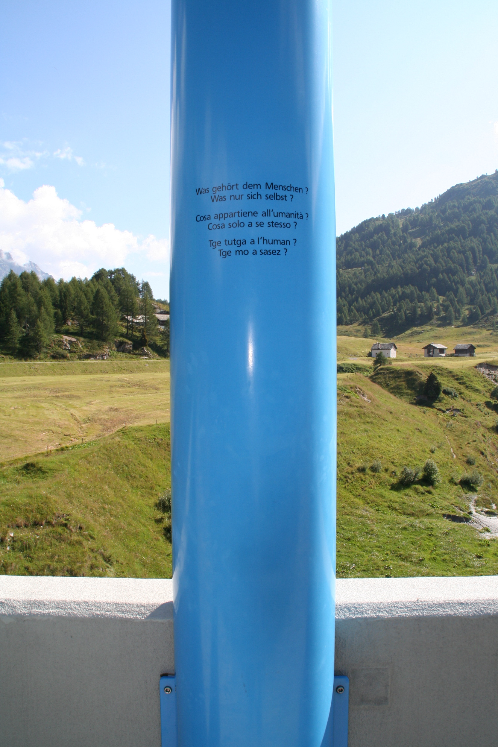 Culurs 3. Säule